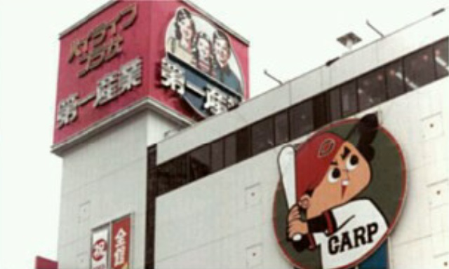 広島市中区にあるエディオン広島本店の前身、ハイライフプラザ第一産業本店当時の概観。